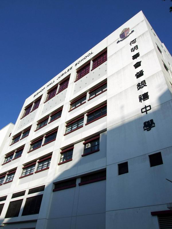 何明華會督銀禧中學